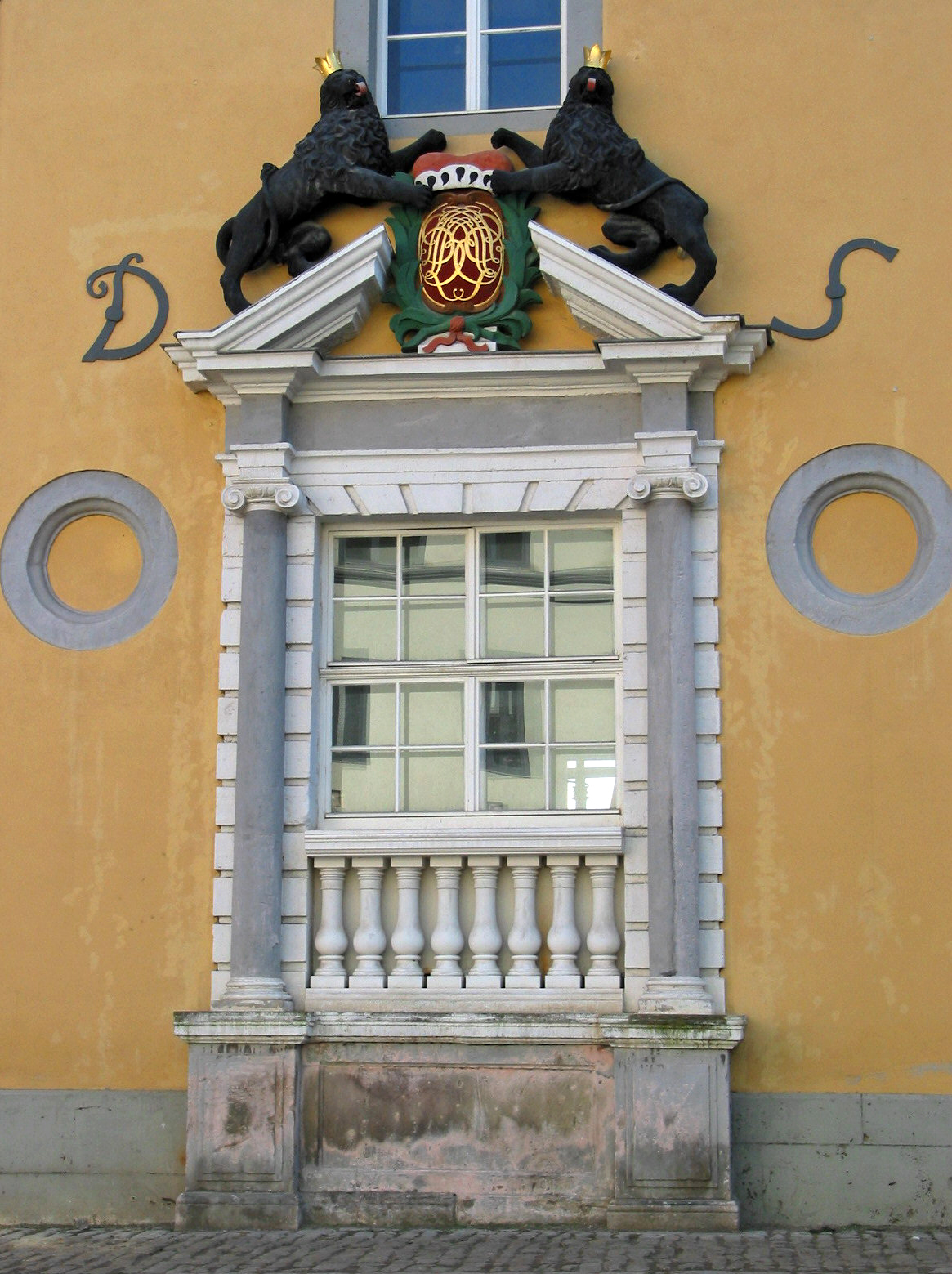 Das imposante Löwentor, benannt nach den beiden Löwenfiguren über dem Wappen, befindet sich auf der Nordseite des Gelben Schlosses, welches im Jahre 1704 als Witwensitz für Herzogin Dorothea Sophia Dux Saxoniae Landgrafia Hasso Homburgiae erbaut wurde. 1945 wurde das Gebäude teilweise zerstört; nach dem II. Weltkrieg jedoch wieder aufgebaut. Das gelbe Schloß befindet sich an der Ecke: Kollegiengasse/ Grüner Markt. Hier wurde 1761 August von Kotzebue (1761-1819) geboren.